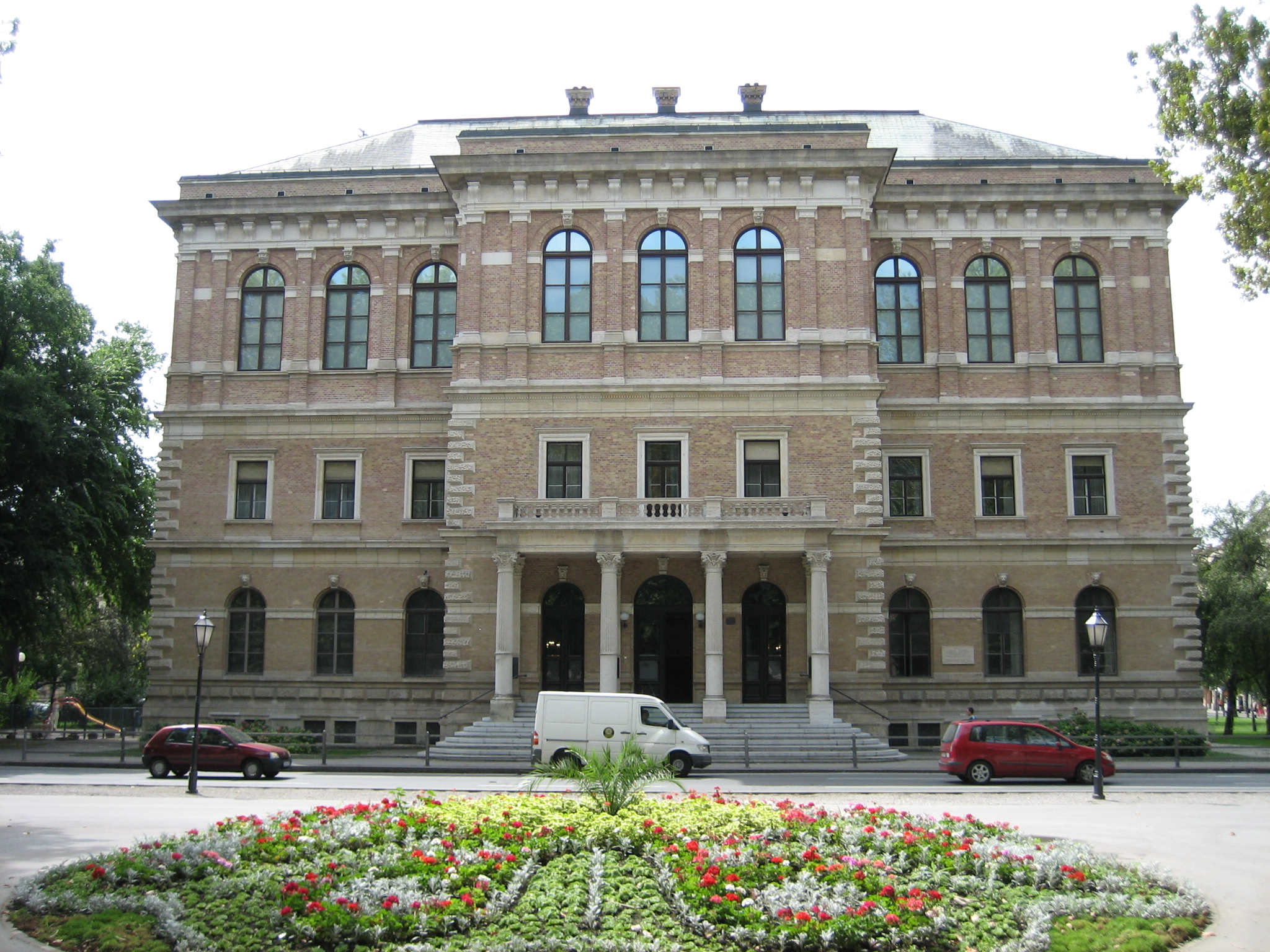 The building of Croatian Academy of Science and Arts, Zagreb / Zgrada Hrvatske akademije znanosti i umjetnosti, Zagreb